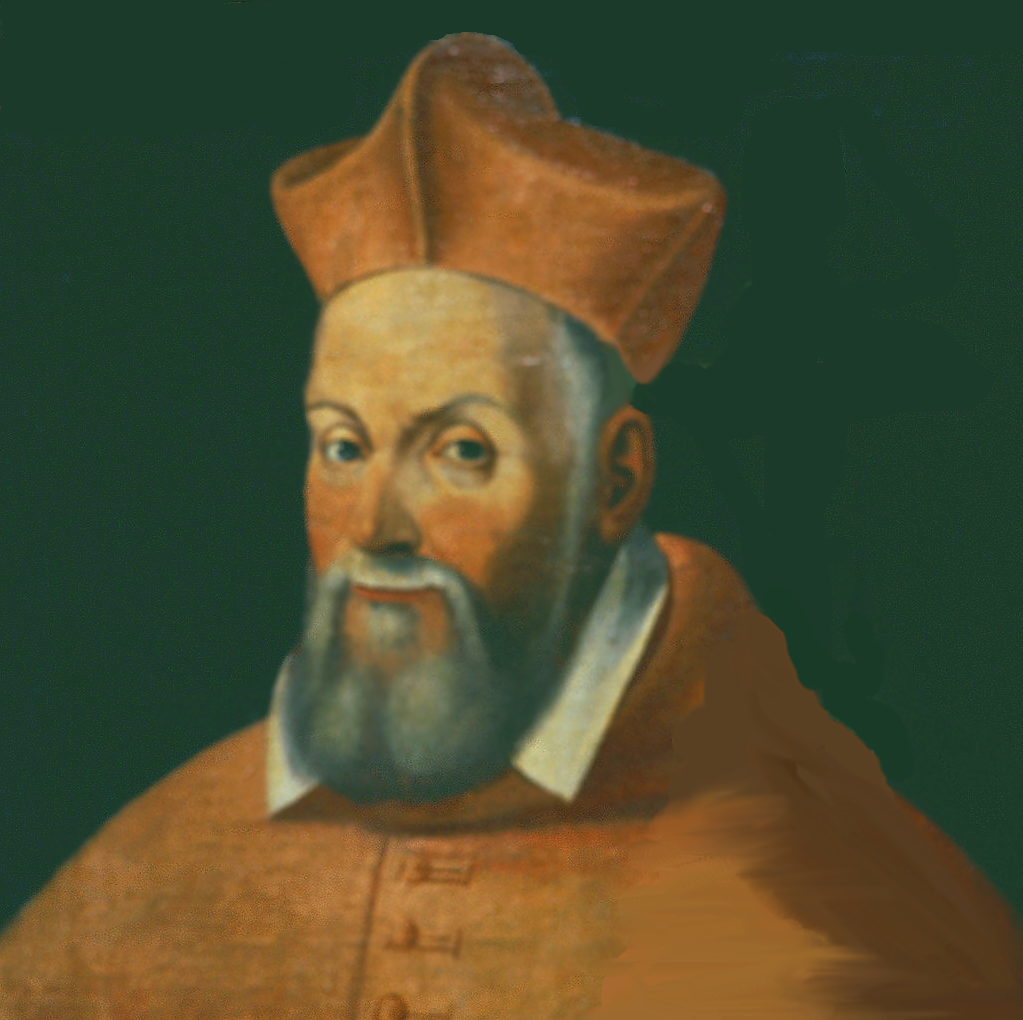 Giovanni Francesco Commendone, papal nuntio in Poland